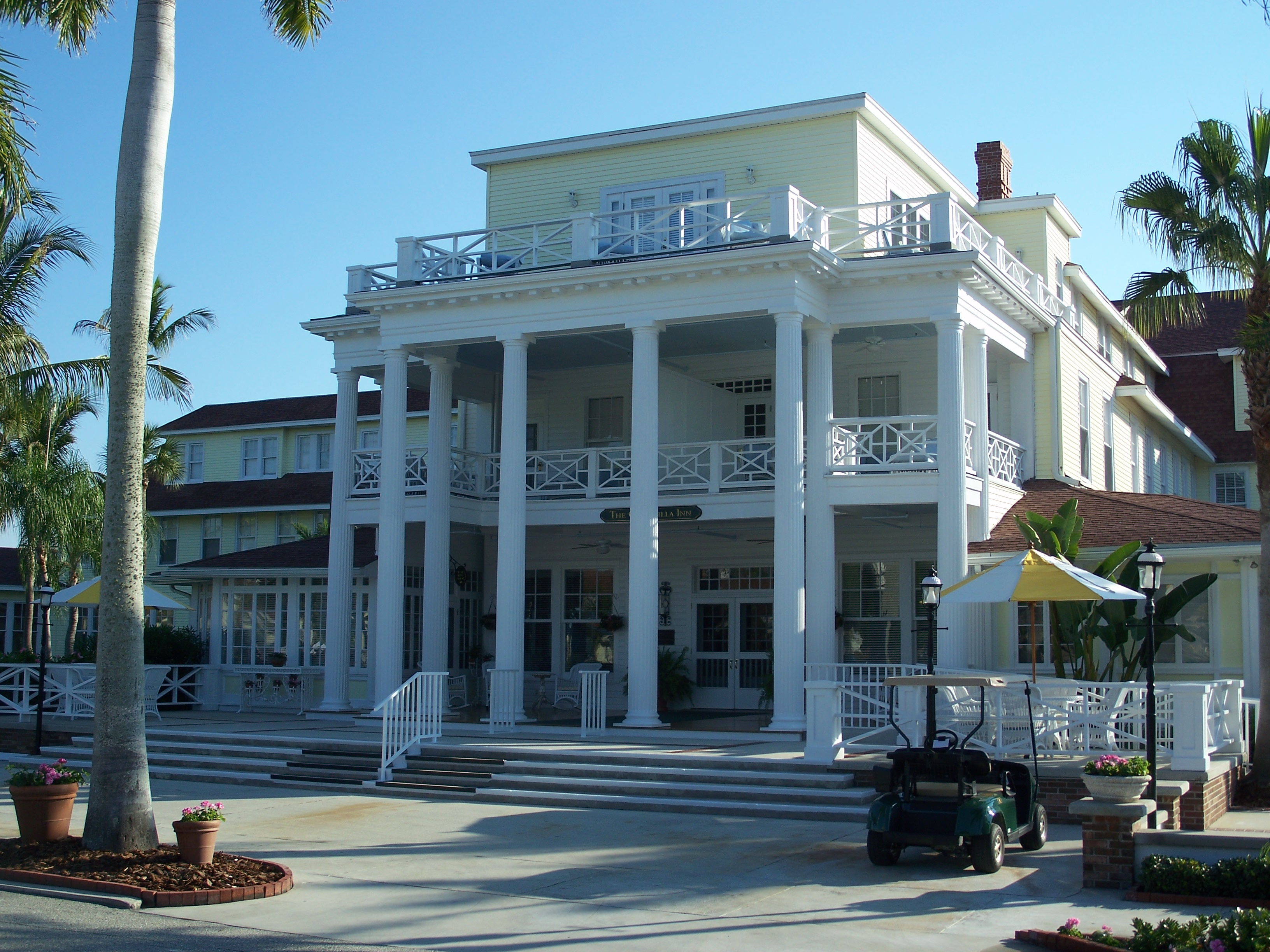 Boca Grande, Florida: Gasparilla Inn Historic District